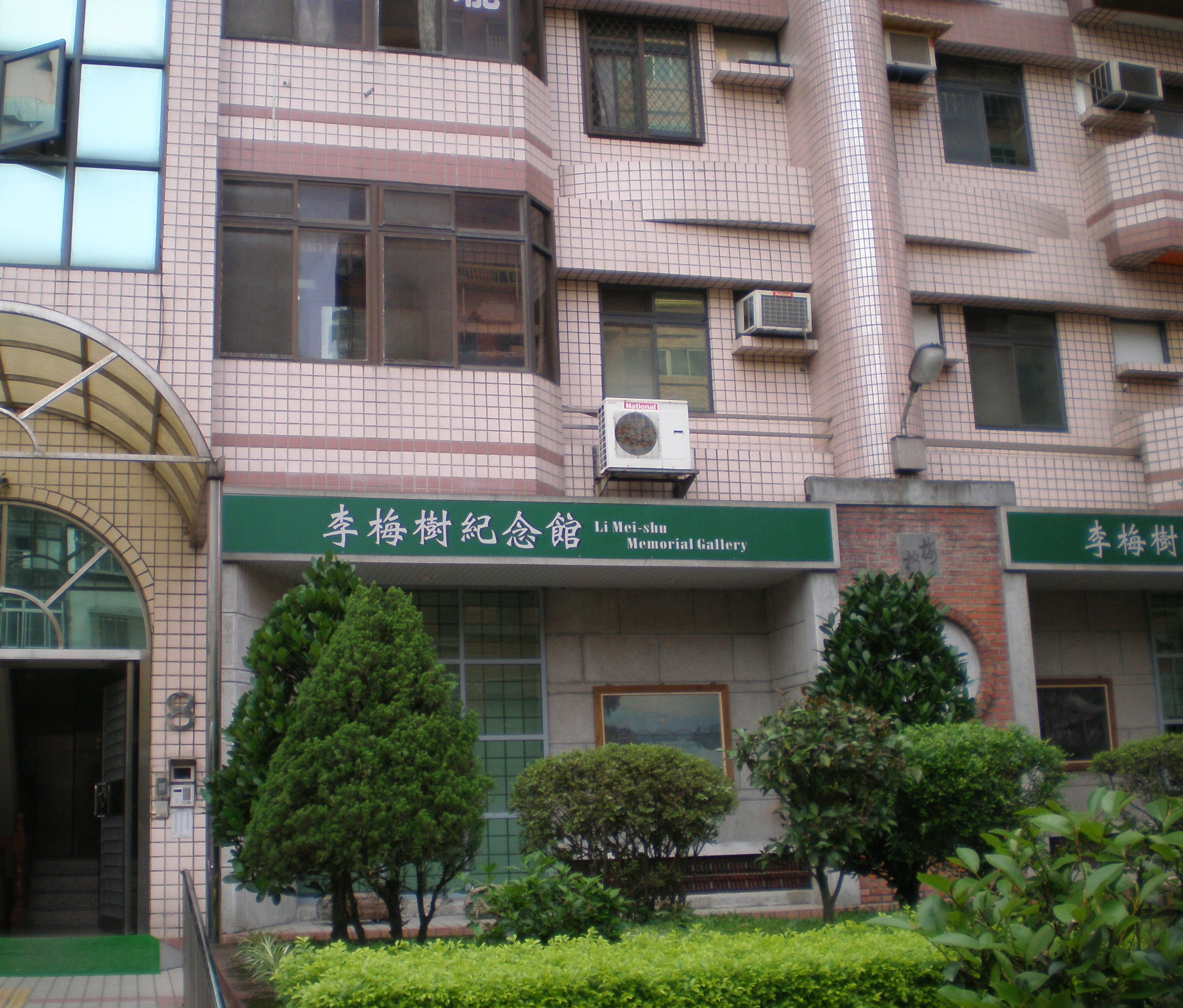 李梅樹紀念館，位於新北市三峽區中華路43巷10號。